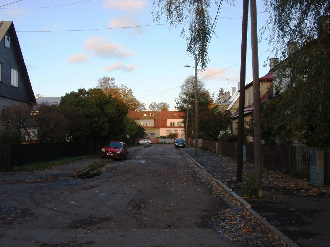 Vaniku tänav Tallinnas Pelgulinnas.